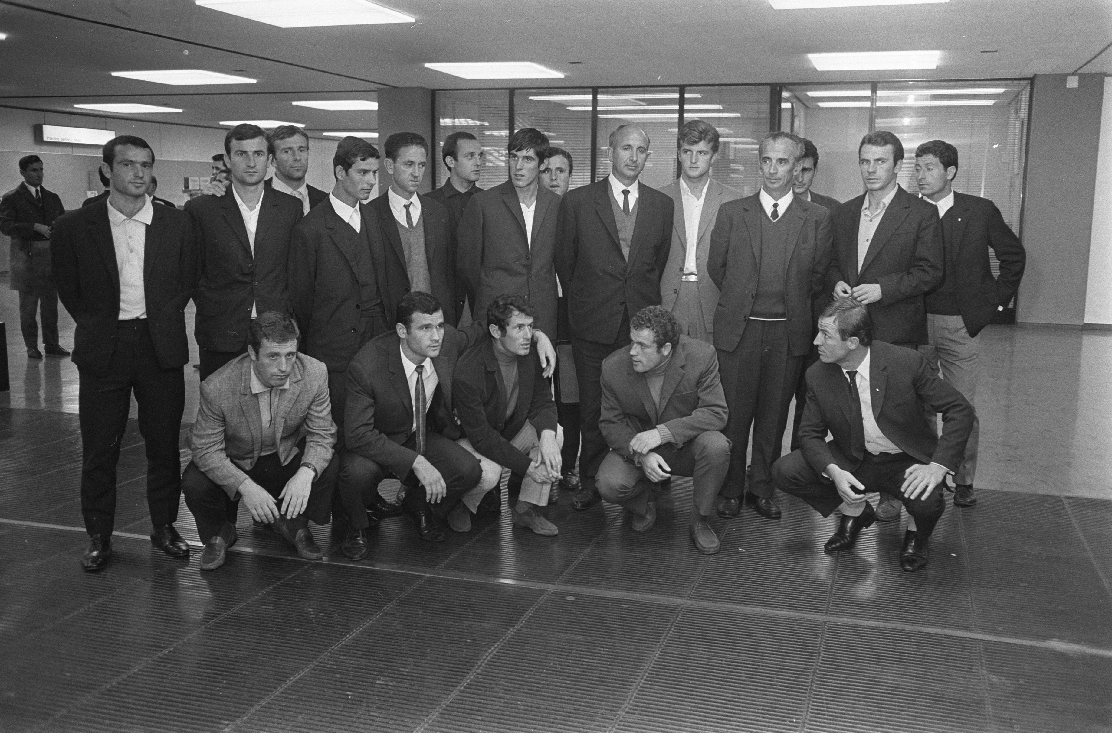 Collectie / Archief : Fotocollectie Anefo Reportage / Serie : [ onbekend ] Beschrijving : Elftal Nendori Tirana uit Albanie arriveert op Schiphol voor wedstrijd tegen Ajax; Efltal en officials Datum : 28 september 1970 Locatie : Noord-Holland, Schiphol Trefwoorden : elftallen, officials, sport, voetbal, wedstrijden Persoonsnaam : Nendori Tirana Fotograaf : Koch, Eric / Anefo Auteursrechthebbende : Nationaal Archief Materiaalsoort : Negatief (zwart/wit) Nummer archiefinventaris : bekijk toegang 2.24.01.05 Bestanddeelnummer : 923-8813